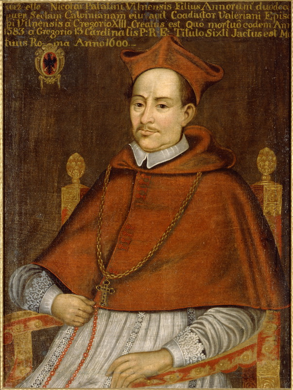 Беларуская (тарашкевіца): Партрэт Юрыя Радзівіла (Jury Radzivił).